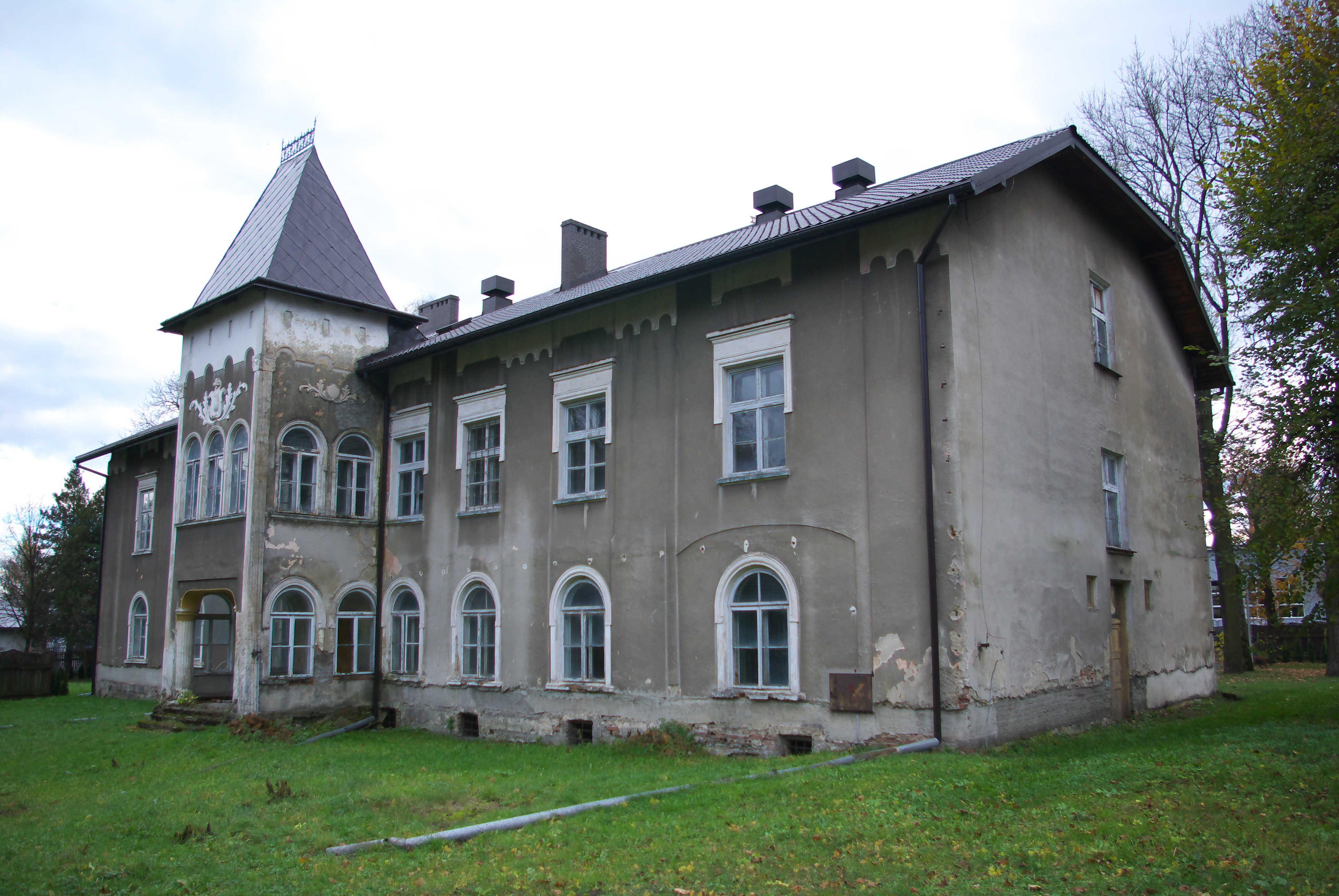 Dwór Mniszek-Tchorznickich w dzielnicy Dąbrówka w Sanoku